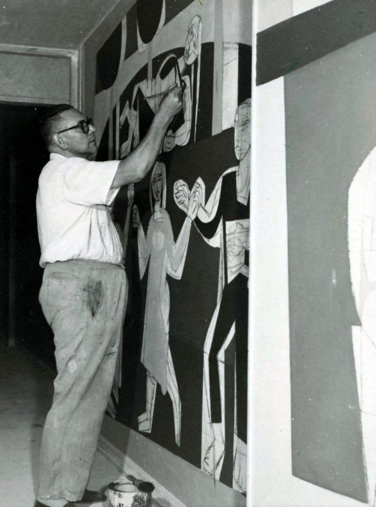 Luis Seoane pintando o mural Músicos y Labradores en Buenos Aires 1956